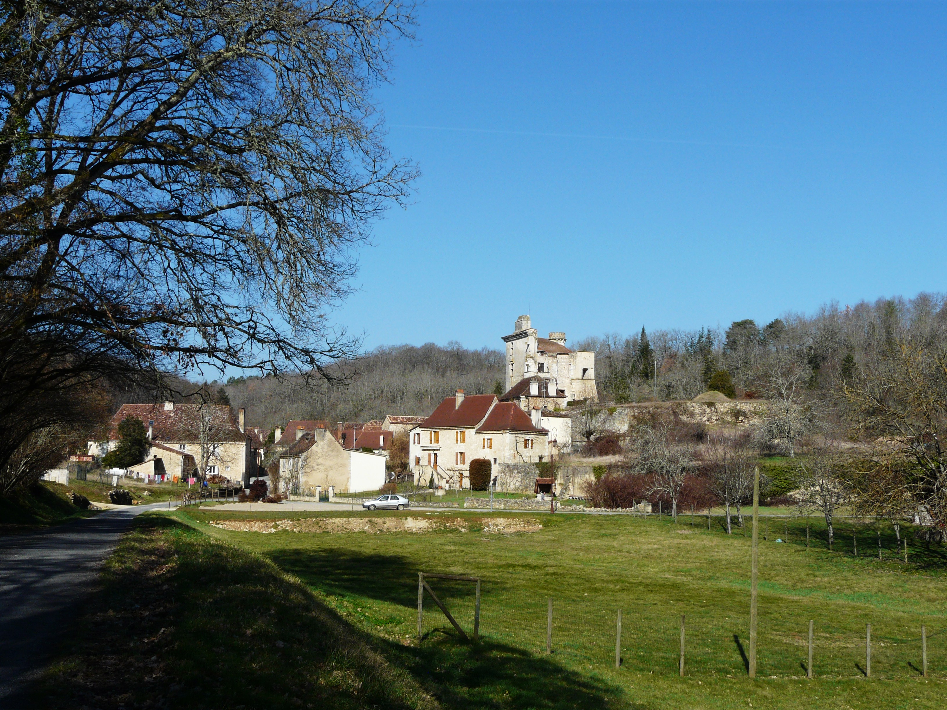 Le village de Saint-Georges-de-Montclard vu du sud-est, Dordogne, France.